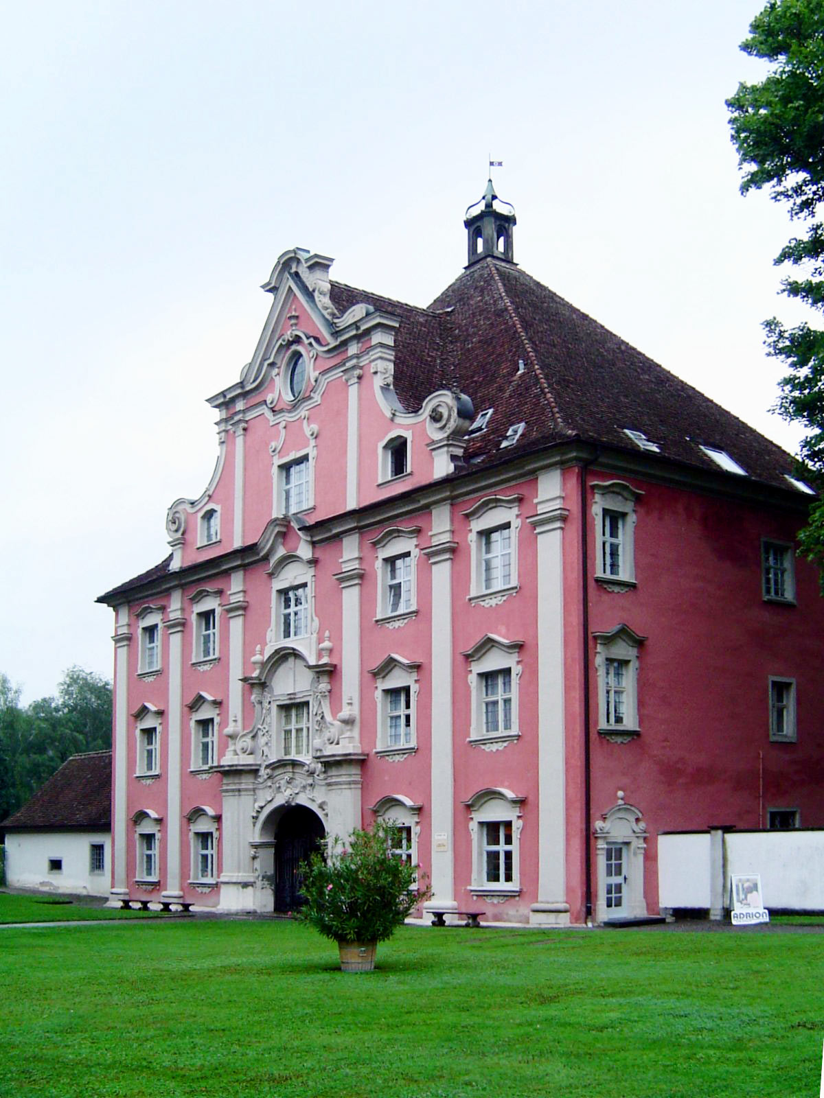 Salem (Germany): Unteres Tor, erected 1735 after plans by architect Lorenz Rüscher; decorations by Joseph Anton Feuchtmayer.